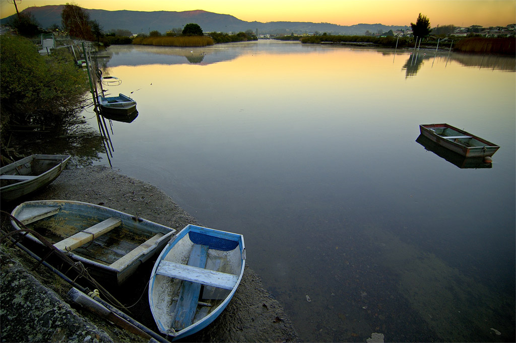 Rio Bidasoa a su paso por Irun (Gipuzkoa)